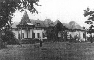 Eugenia Apostolopulo-Bogdan in ograda conacului.